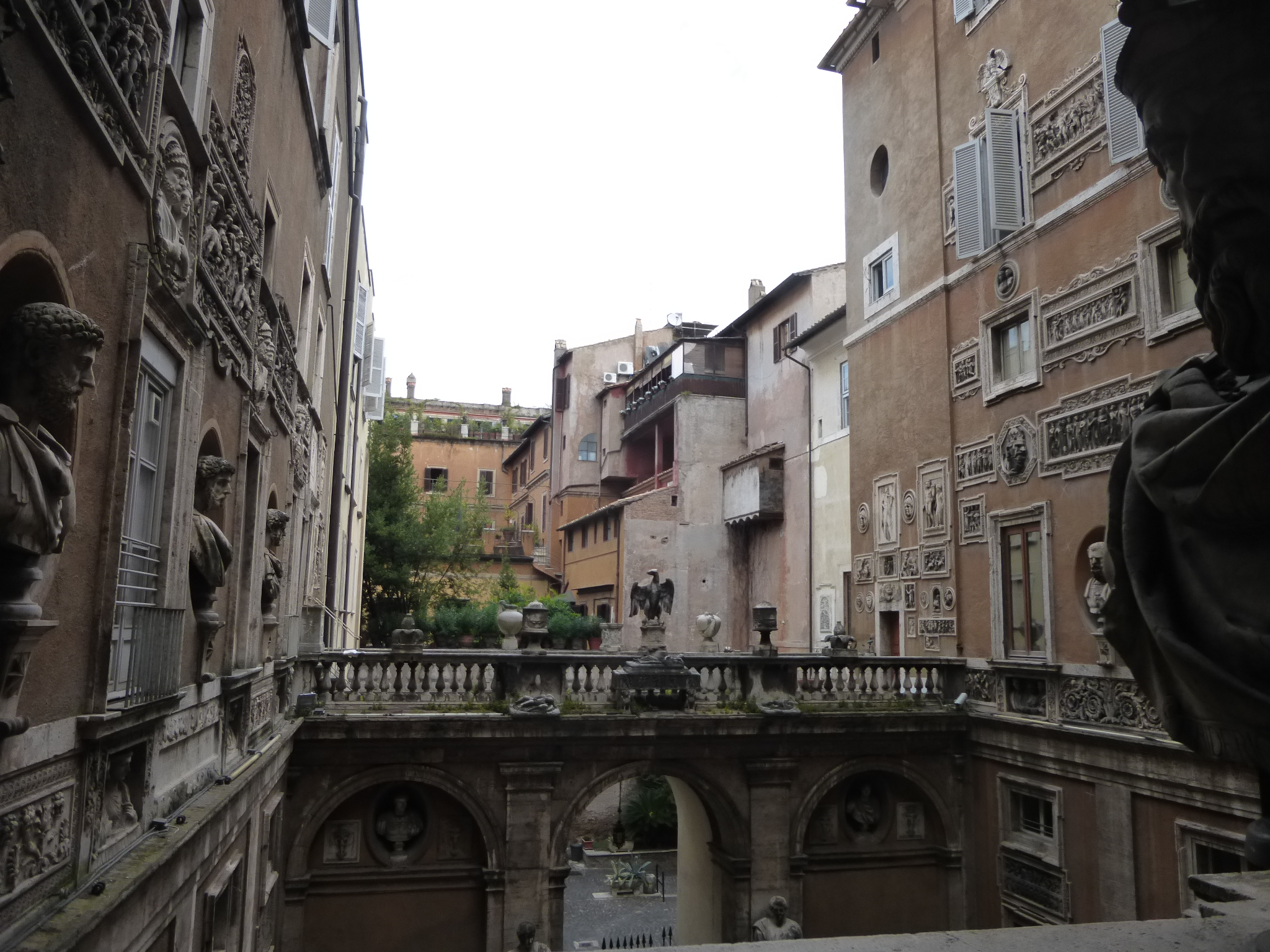 Roma, palazzo Matte di Giove.